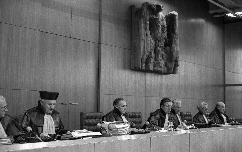 Bundesverfassungsgericht Karlsruhe mündliche Verhandlung über die Verfassungsmäßigkeit der vom Bundestag beschlossenen Fristenregelung vor dem 1. Senat